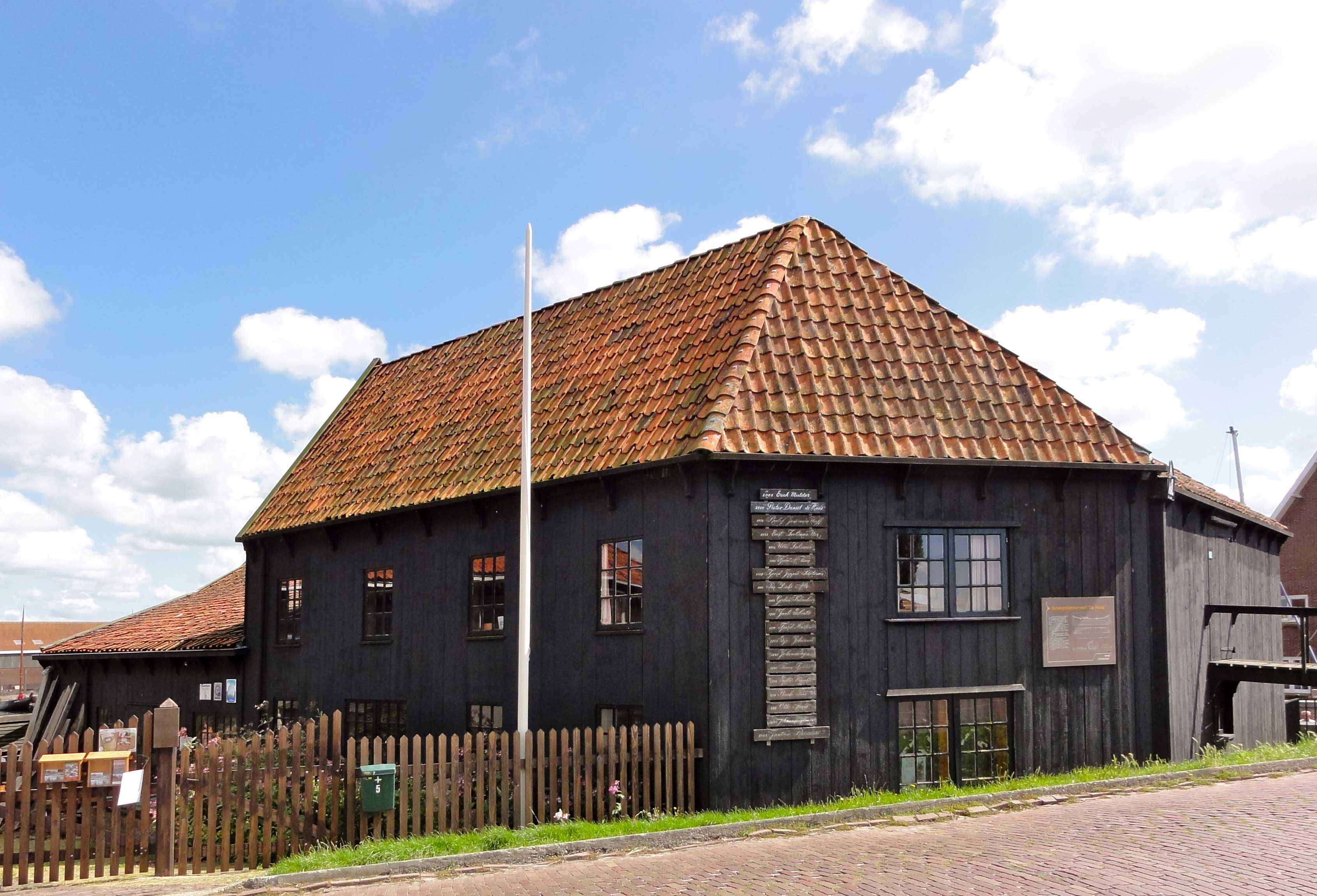 Scheepstimmerwerf De Hoop Séburch 5 Workum